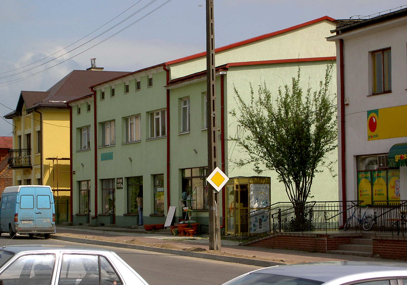 Narol, Poland (podkarpackie) • Rynek / Town square